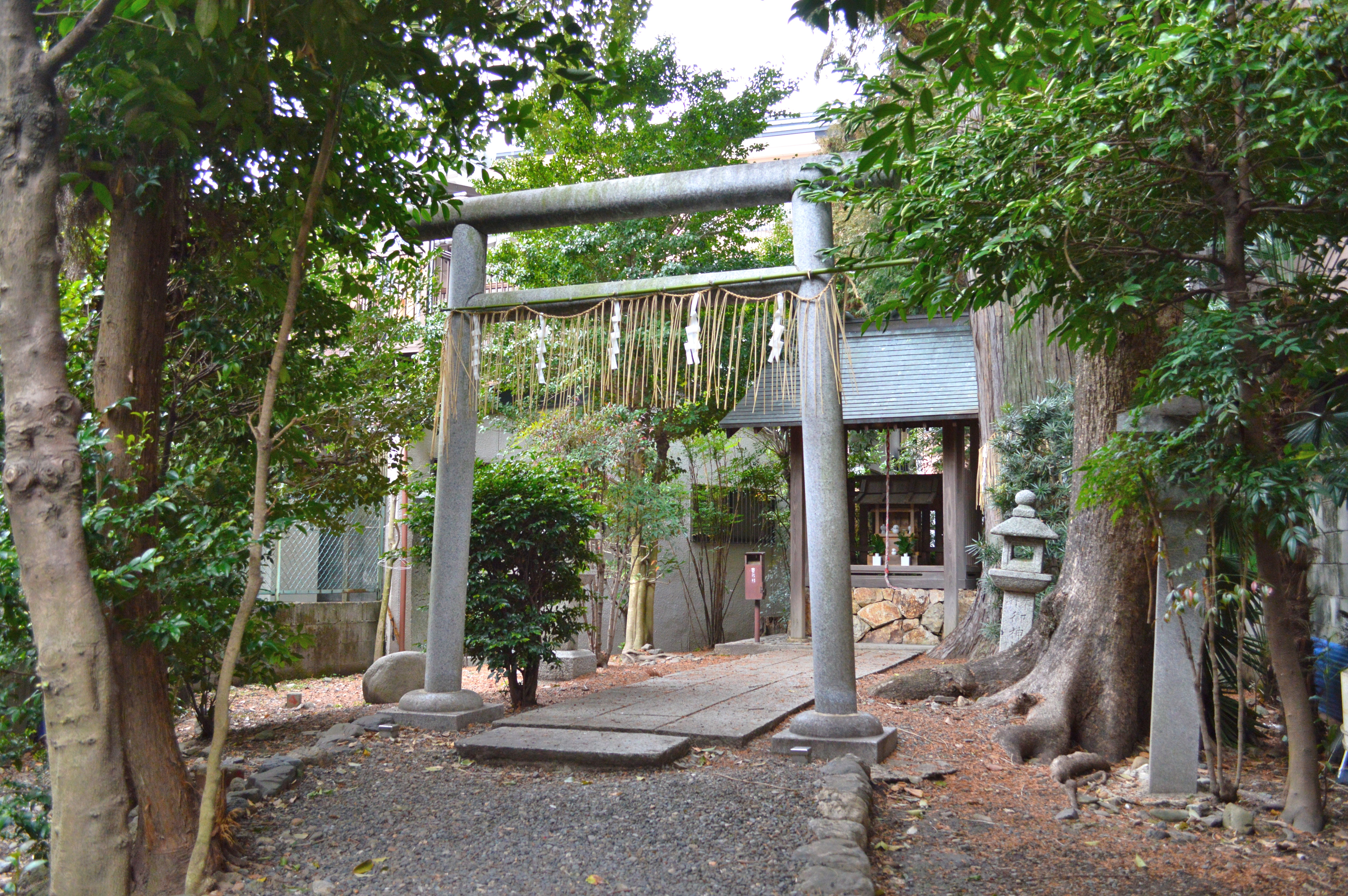 阿刀神社 社殿